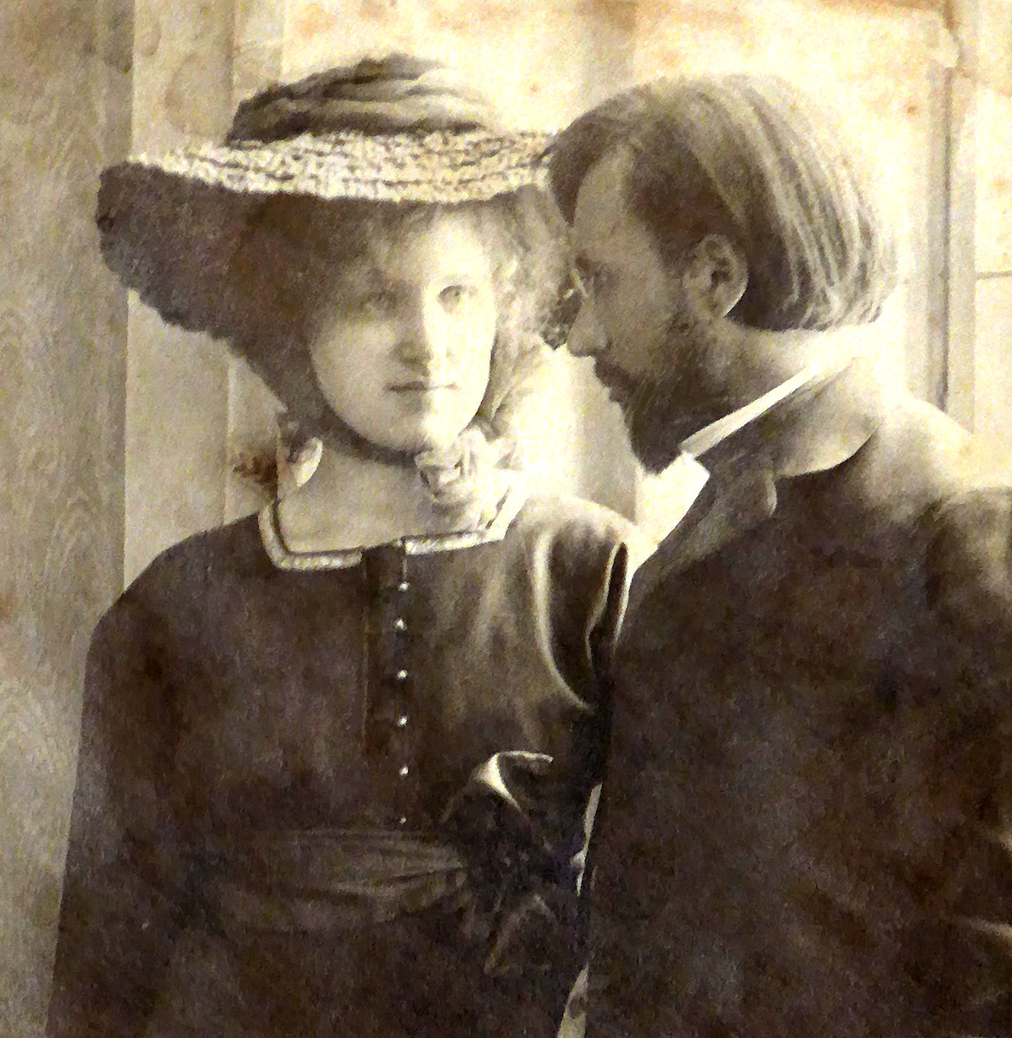 Ehepaar Walter und Johanna Schulze (geb. Lange)